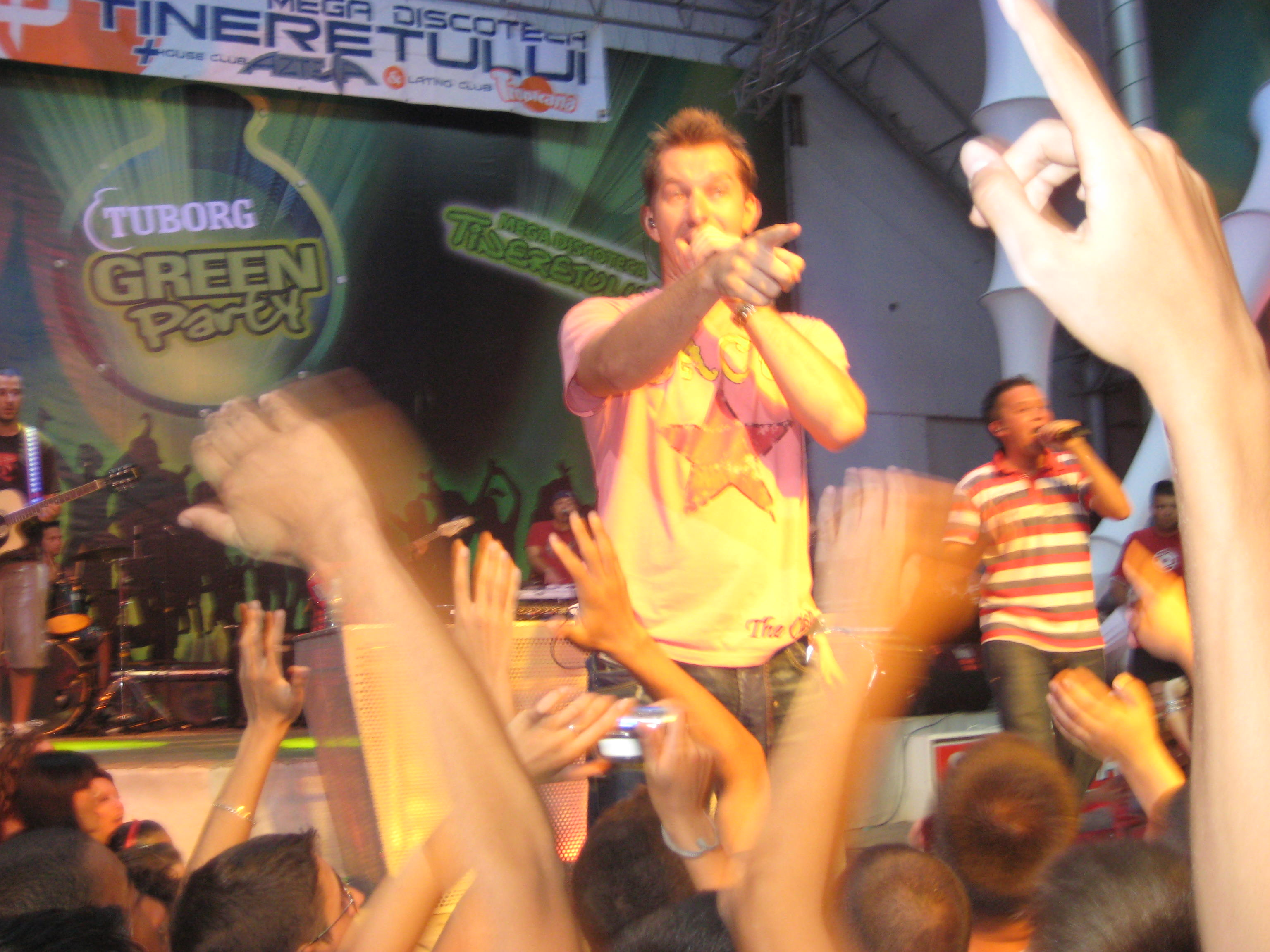 Hi-Q at Mega Discoteca Tineretului